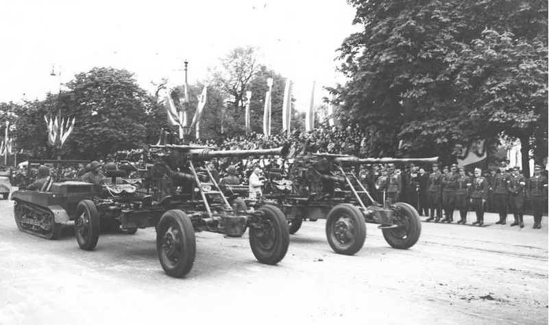 Uroczystości 3 Maja w Warszawie: Oddziały artylerii przeciwlotniczej w defiladzie w Alejach Ujazdowskich. Widoczne armaty przeciwlotnicze Bofors 40 mm zaprzęgnięte do ciągników artyleryjskich C2P.